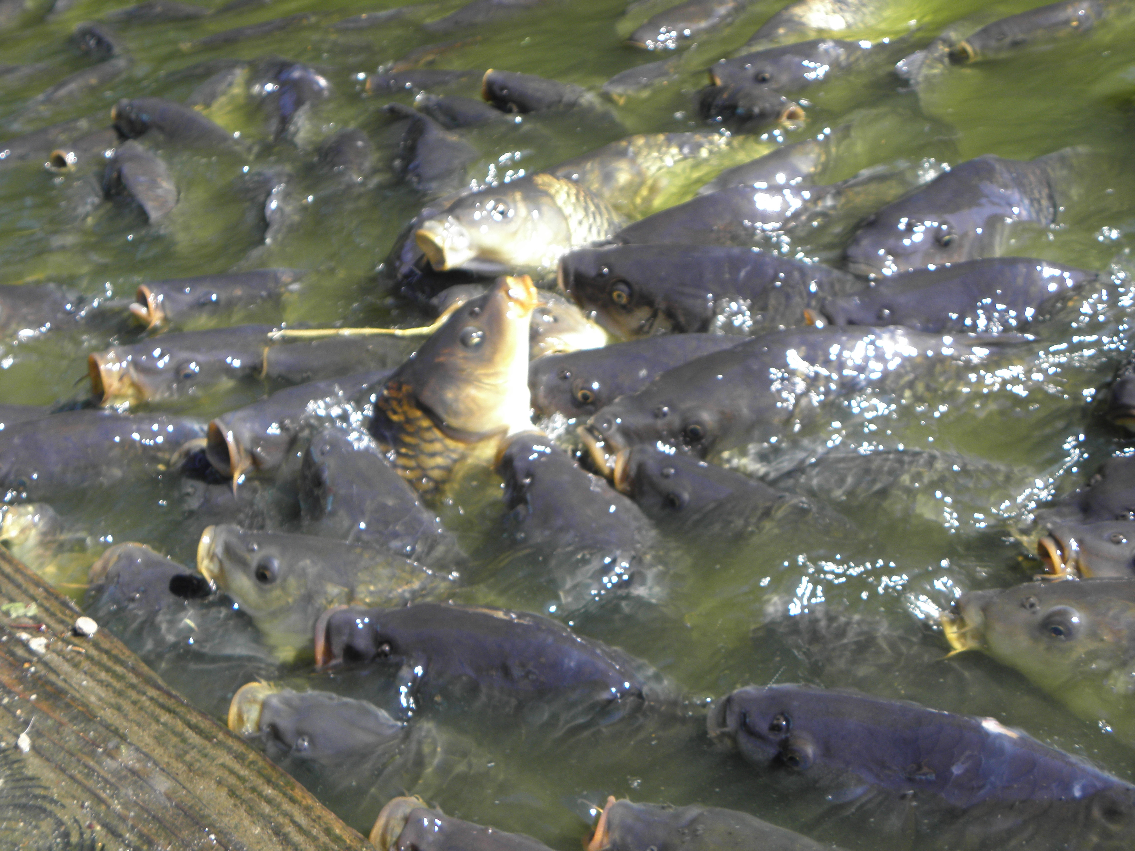 Cyprinus carpio